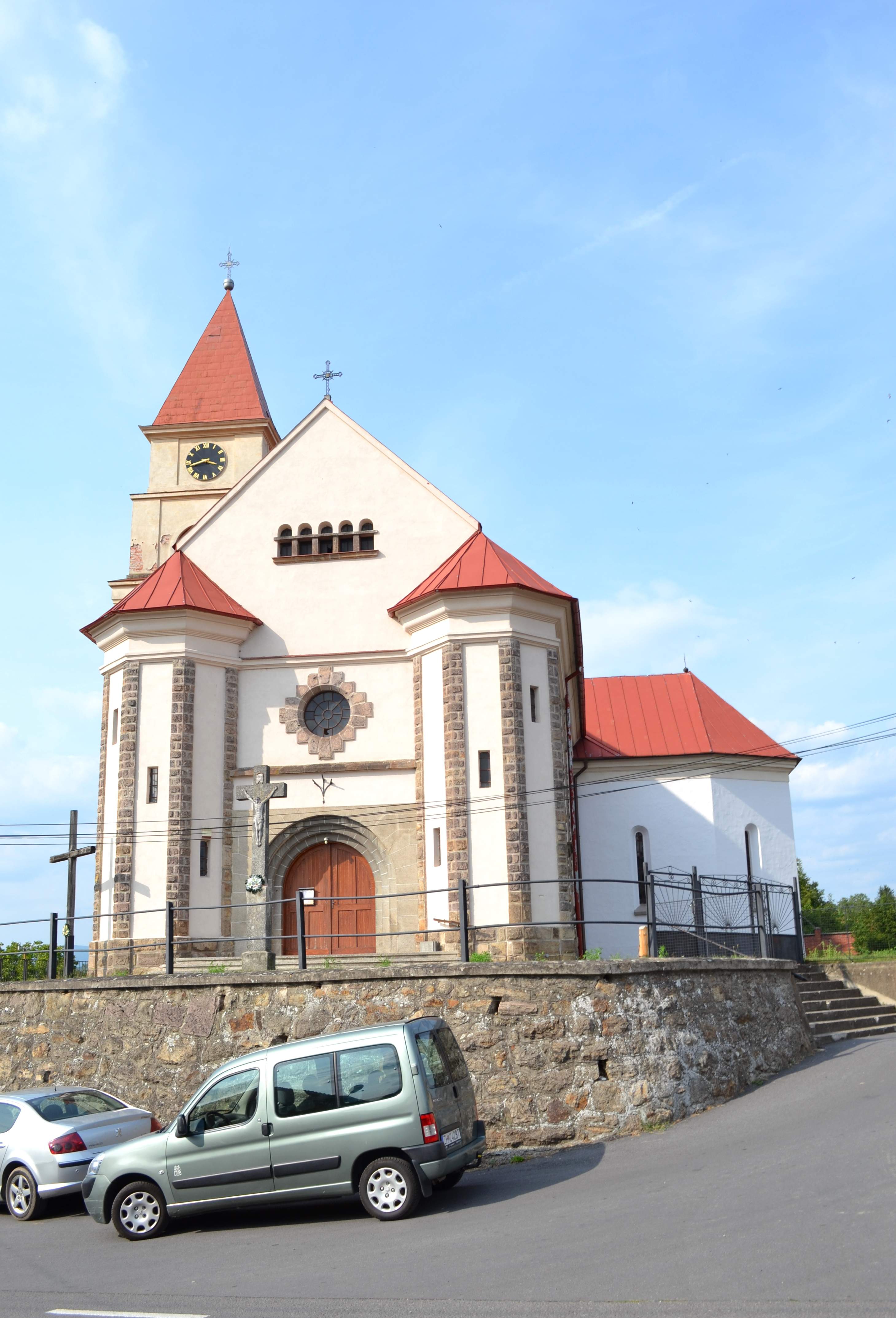 Farský kostol Krista Kráľa v Ladomerskej Vieske